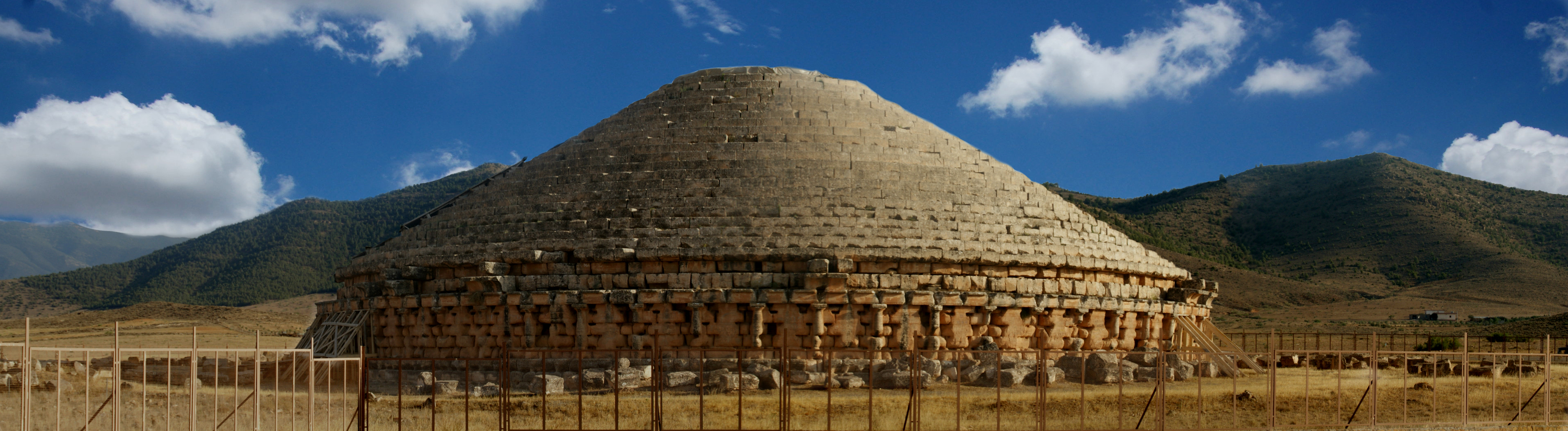 Mausolée des Rois numides dit le Medracen